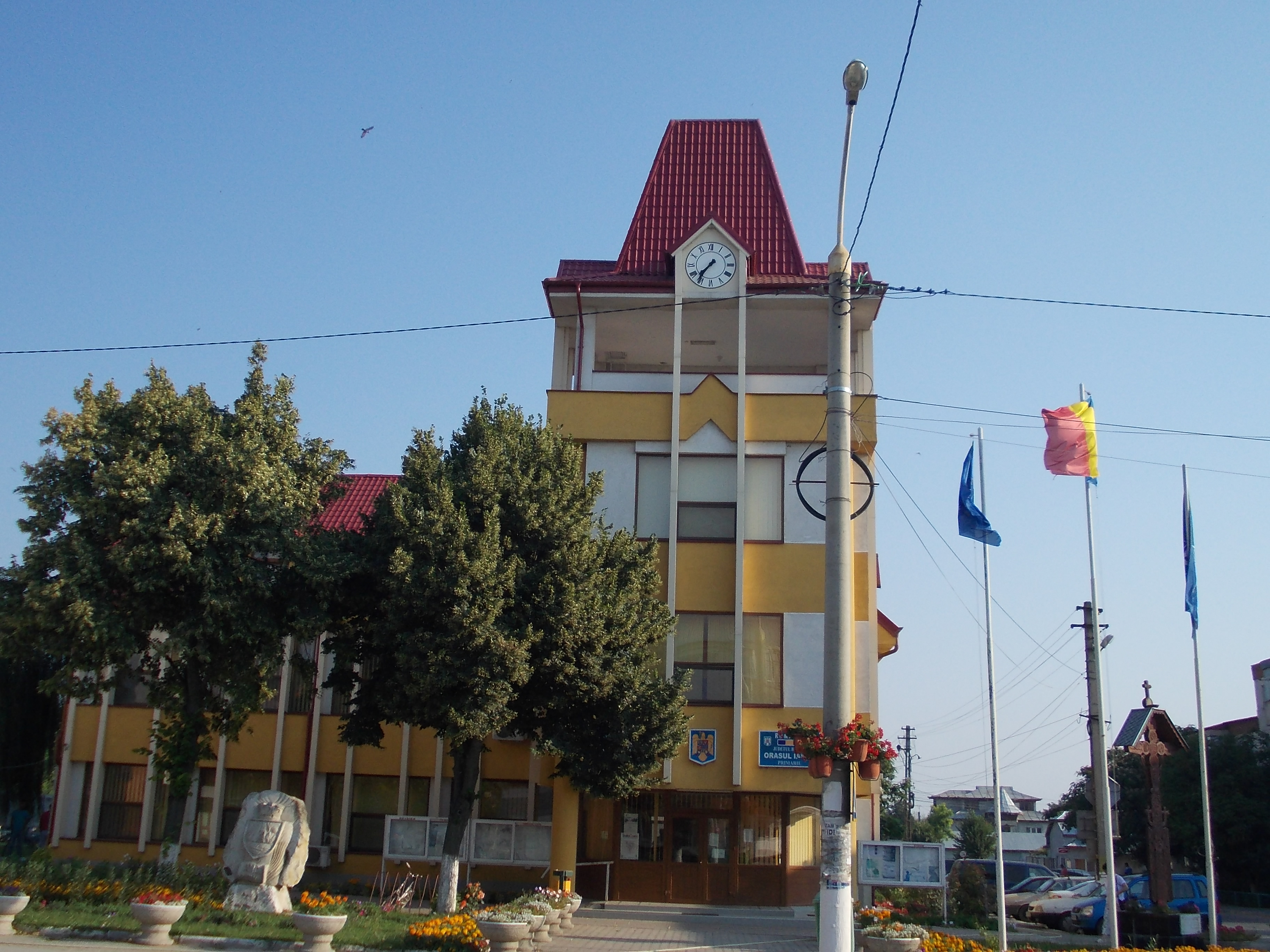 Primăria oraşului Ianca,Brăila